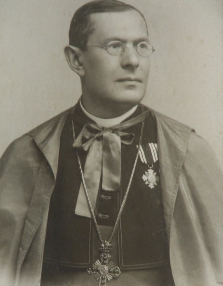 Wenzel Manlik (1861-1921), český římskokatolický kněz